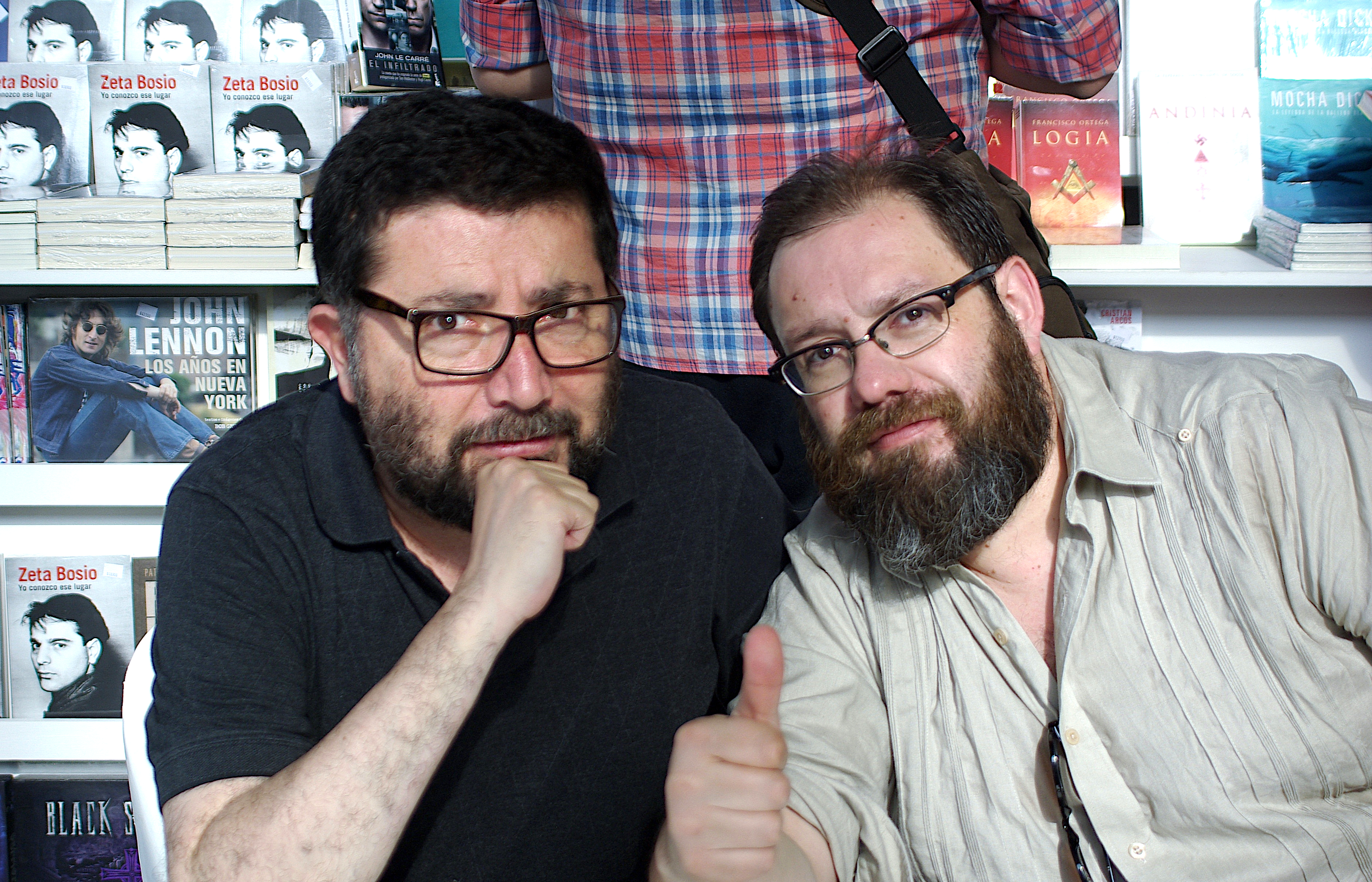 El historietista chileno Gonzalo Martínez y el escritor Francisco Ortega en la Feria Internacional del Libro de Santiago 2016